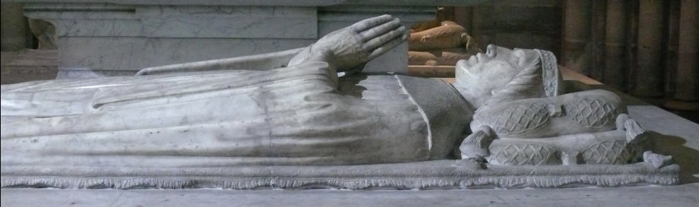 Philippe d'Orléans (1396-1420)